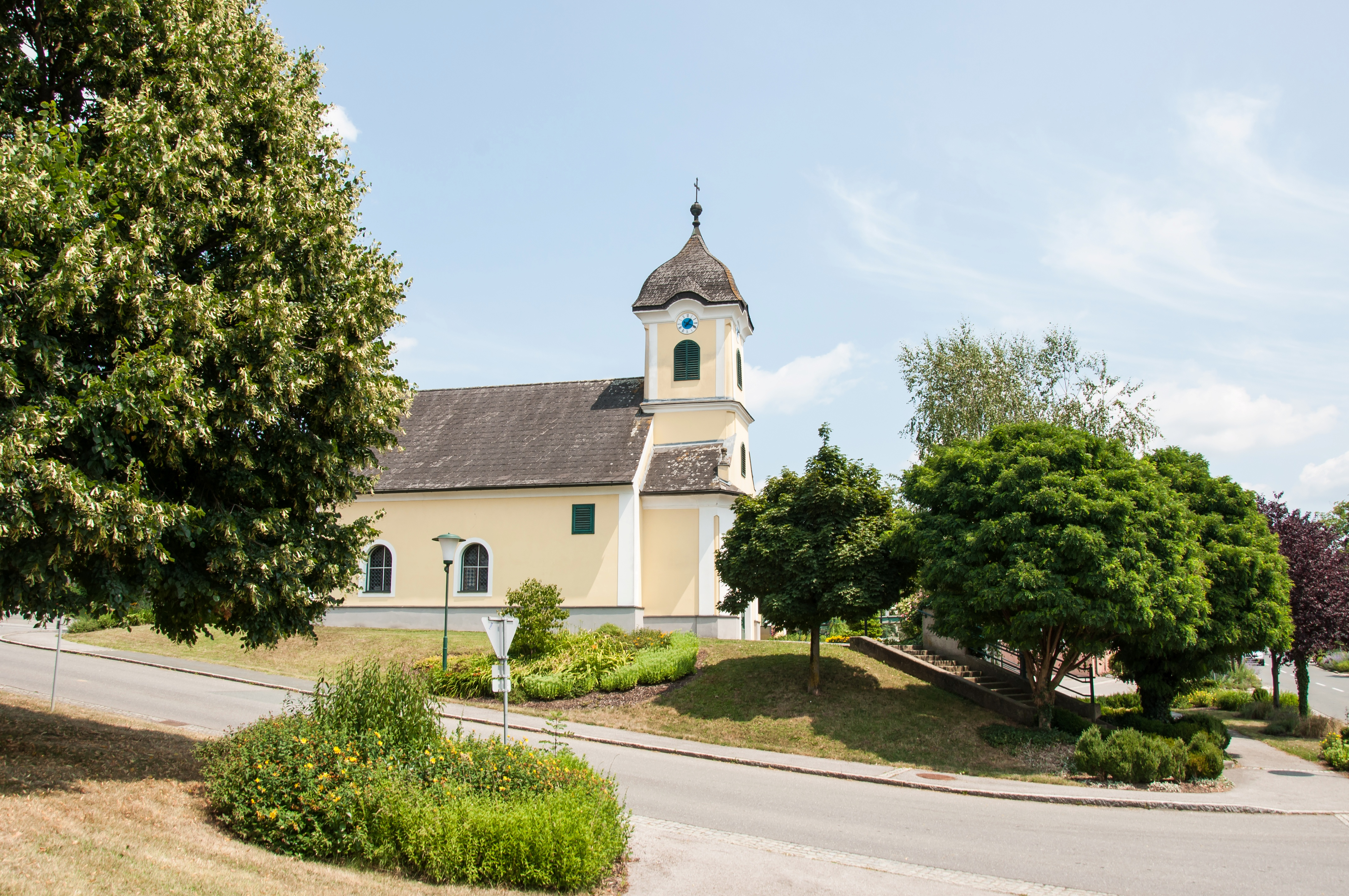 Ortskapelle